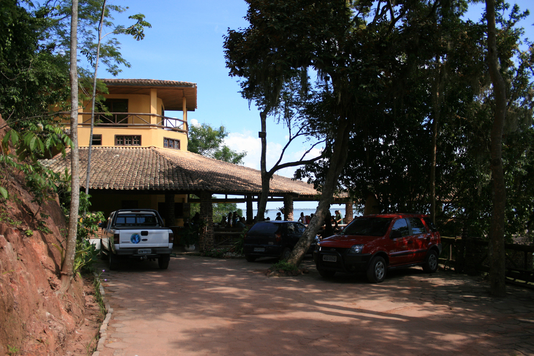 Lagoa Juparanã - Cabana do Minotauro 01